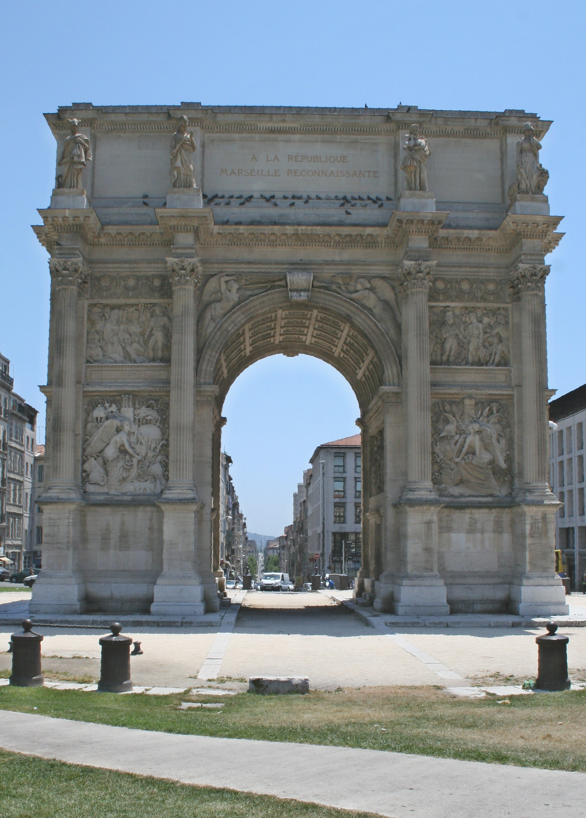 Arc de triomphe de la porte d'Aix à Marseille